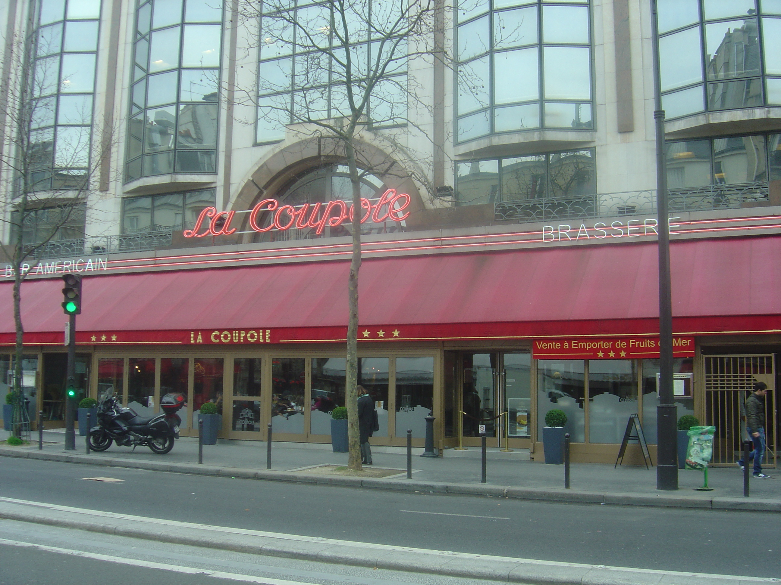 Το Καφέ Λα Κουπόλ, Παρίσι - Μονπαρνάς, 2011